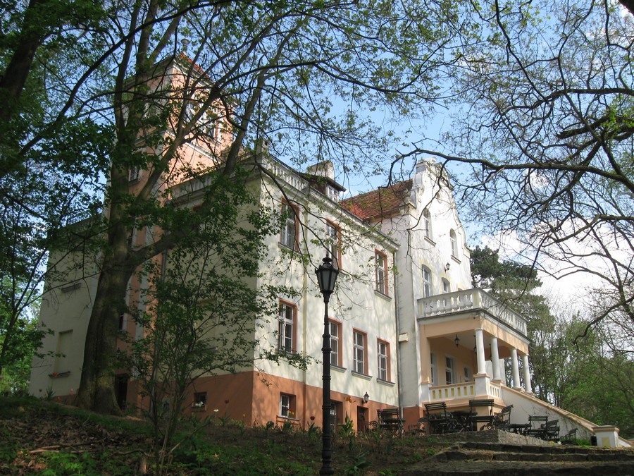 Witosław - dwór (zabytek nr rejestr. 1521/A)